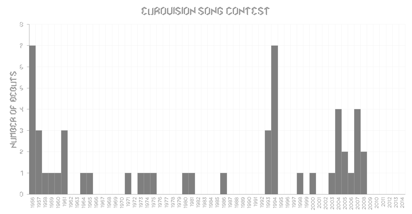 Aceasta imagine contine numarul tarilor debutante in fiecare an la Eurovision.